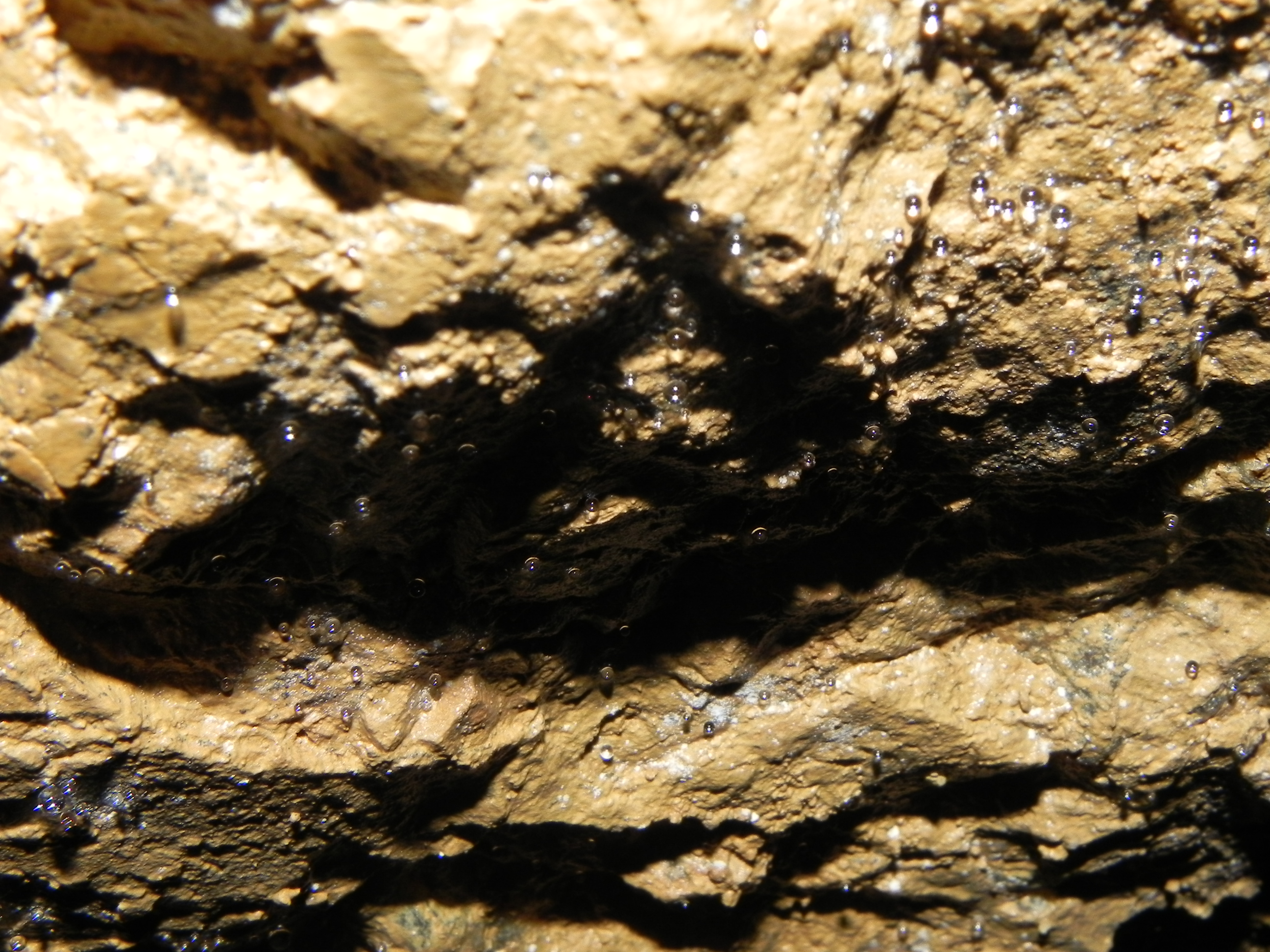 kvapky vody